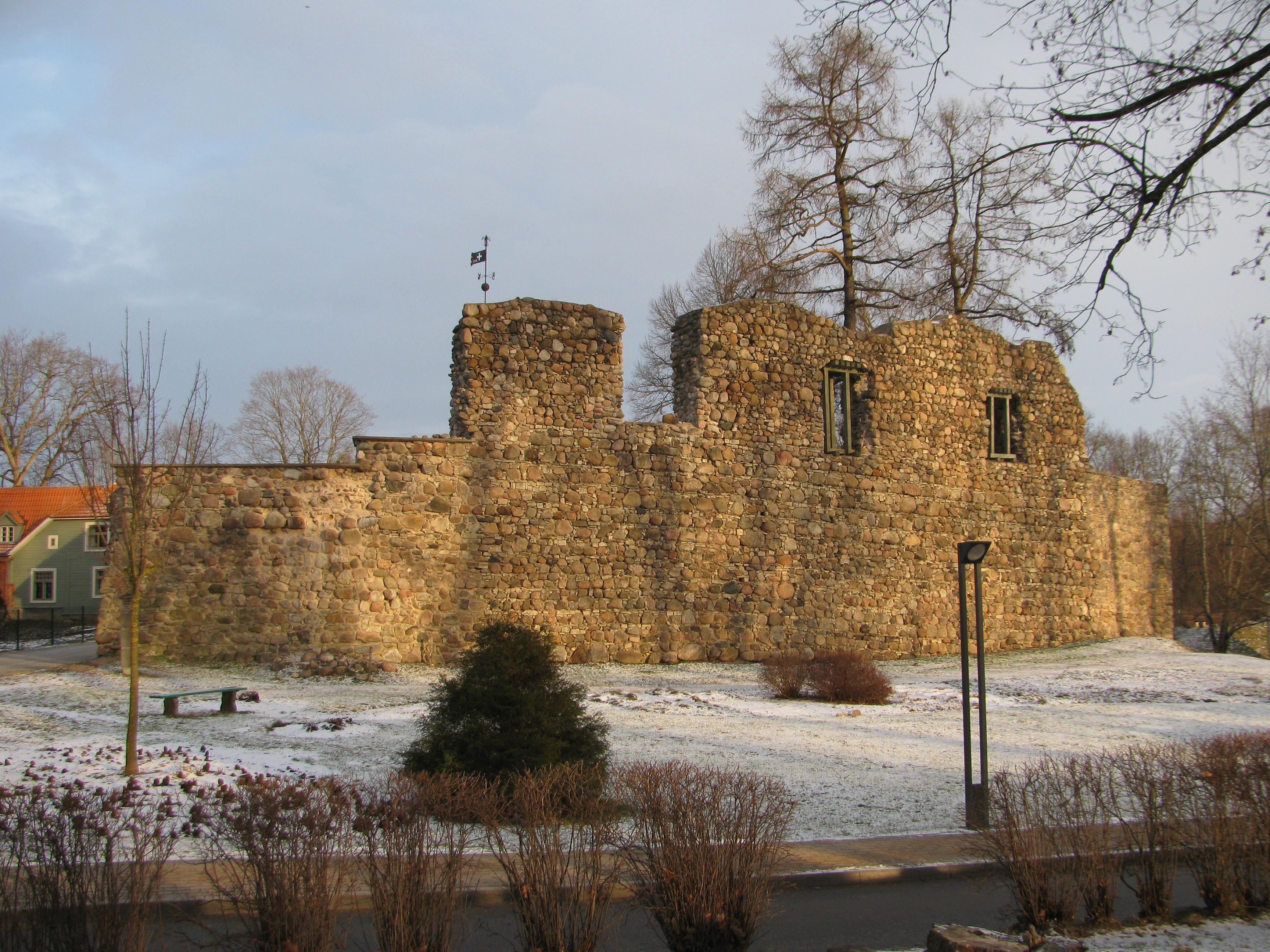 Valmieras pilsdrupas un pilsētas viduslaiku nocietinājumi, Valmiera, Bruņinieku iela 2